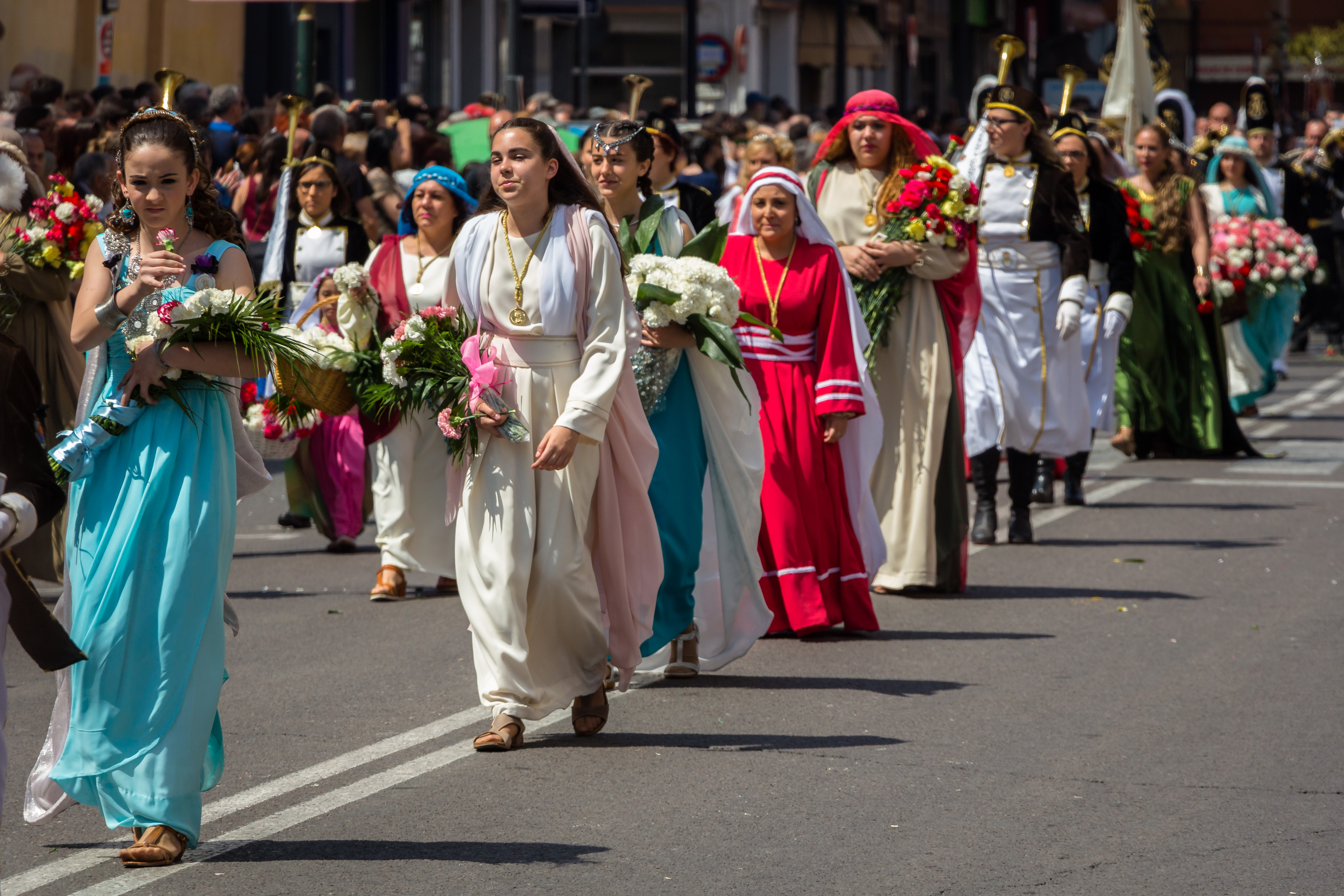 El Desfile de Resurrección es un acto único entre las celebraciones de Semana Santa, pues lo domina la alegría y el colorido. Para celebrar la Resurección de Cristo, los personajes bíblicos sustituyen sus objetos alegóricos por flores que lanzan al público. This is a photography of a Folklore festival in Spain (Wikidata id Q9075846).